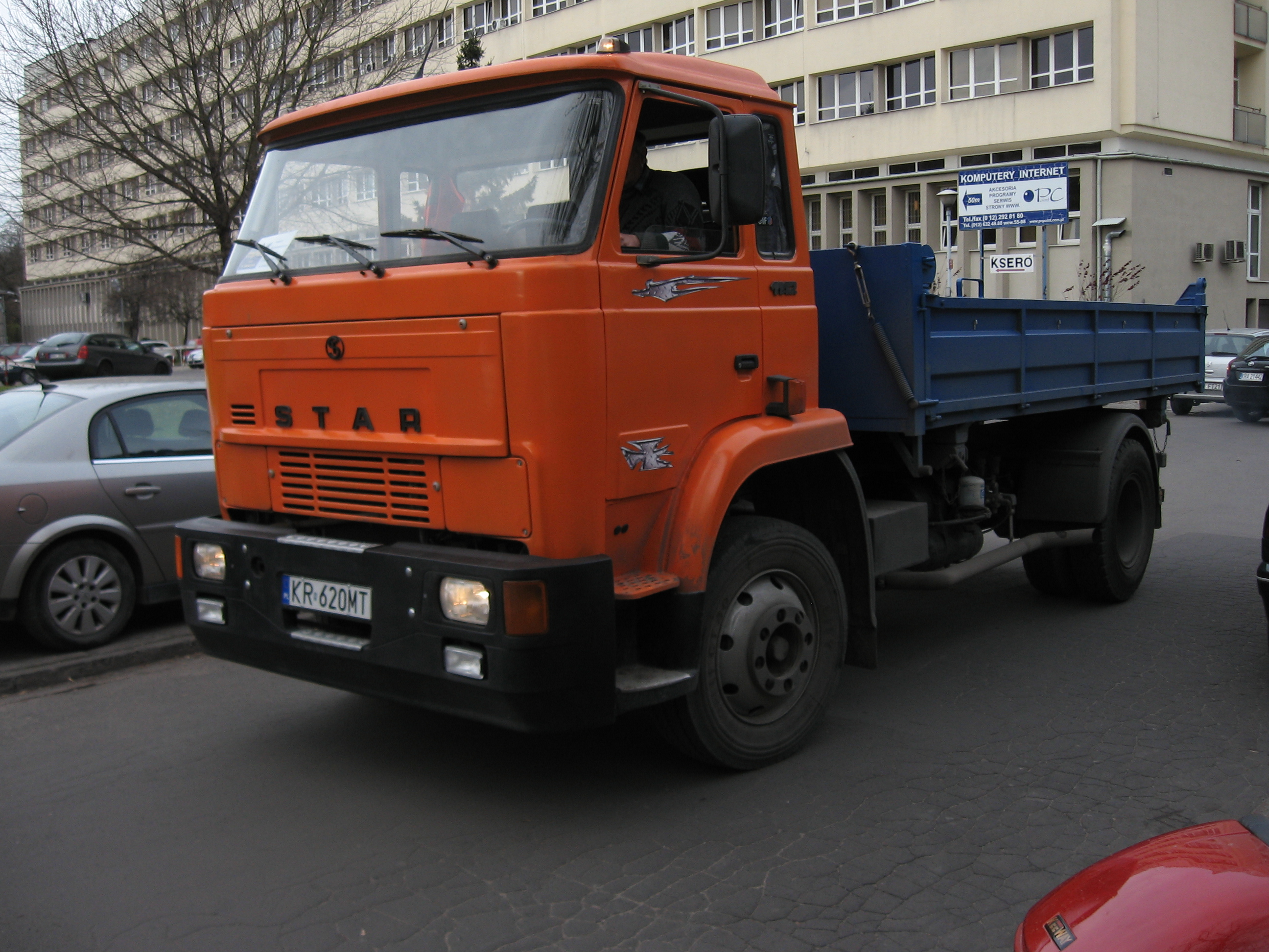 Star 1142 in Kraków.